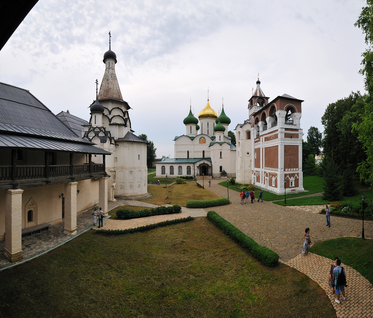 Ансамбль Спасо-Евфимиева монастыря (Владимирская область, Суздаль, улица Ленина)